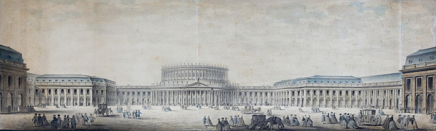 France, vers 1784 Projet d’aménagement de la place du Carrousel au Louvre Crayon noir, plume et encre de chine, lavis gris et aquarelle - 39,5 x 132,5 cm Paris, Musée du Louvre Photo : Azur Enchères